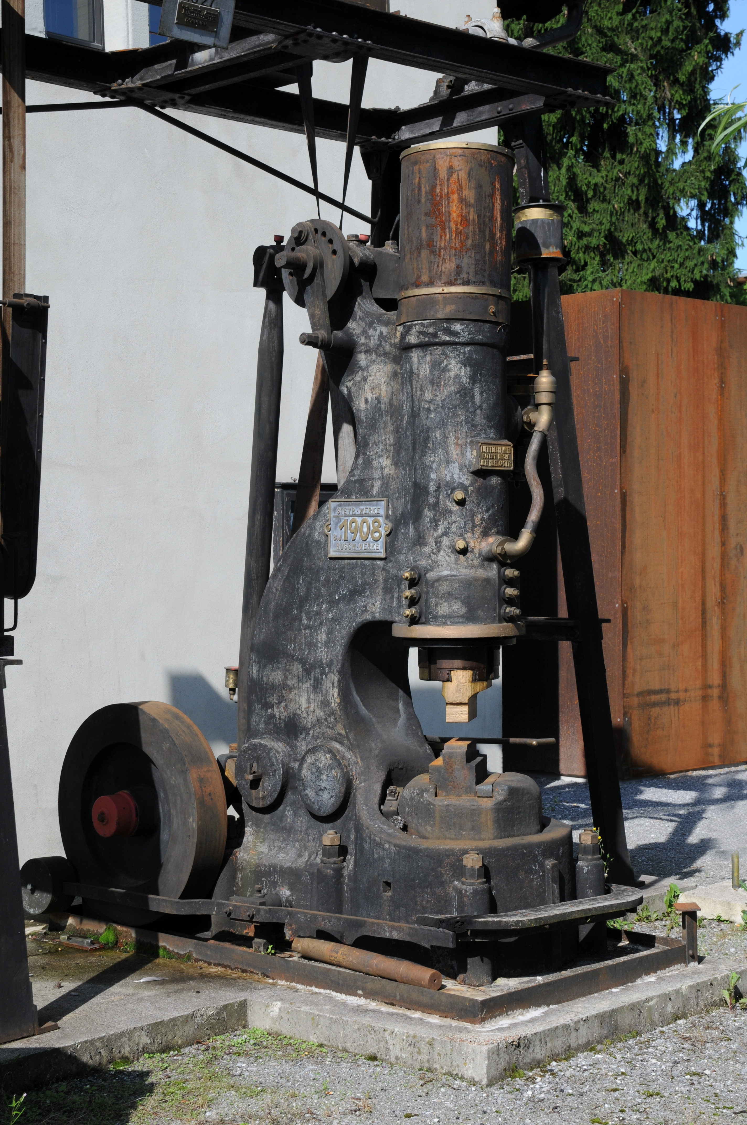 Ein Luftfederhammer Bêché (Jean Bêché (1855-1917), Fabrikant, Bêché & Grohs Maschinenfabrik, Hückeswagen, 1932 Konstruktion und Bau des weltweit ersten Gegenschlaghammers für die Gesenkschmiedeindustrie) ist eine zum Schmieden verwendete Umformmaschine. Kennzeichnend für den mechanisierten Schmiedehammer ist, dass das Verformungswerkzeug im Gegensatz zur eher langsamen Bewegung in einer Presse mit hoher Geschwindigkeit die Verformungsenergie auf das Werkstück abgibt. Das Werkzeug zur Energieabgabe auf das Werkstück wird als Hammerbär bezeichnet. Aufgenommen im Areal der Inatura.